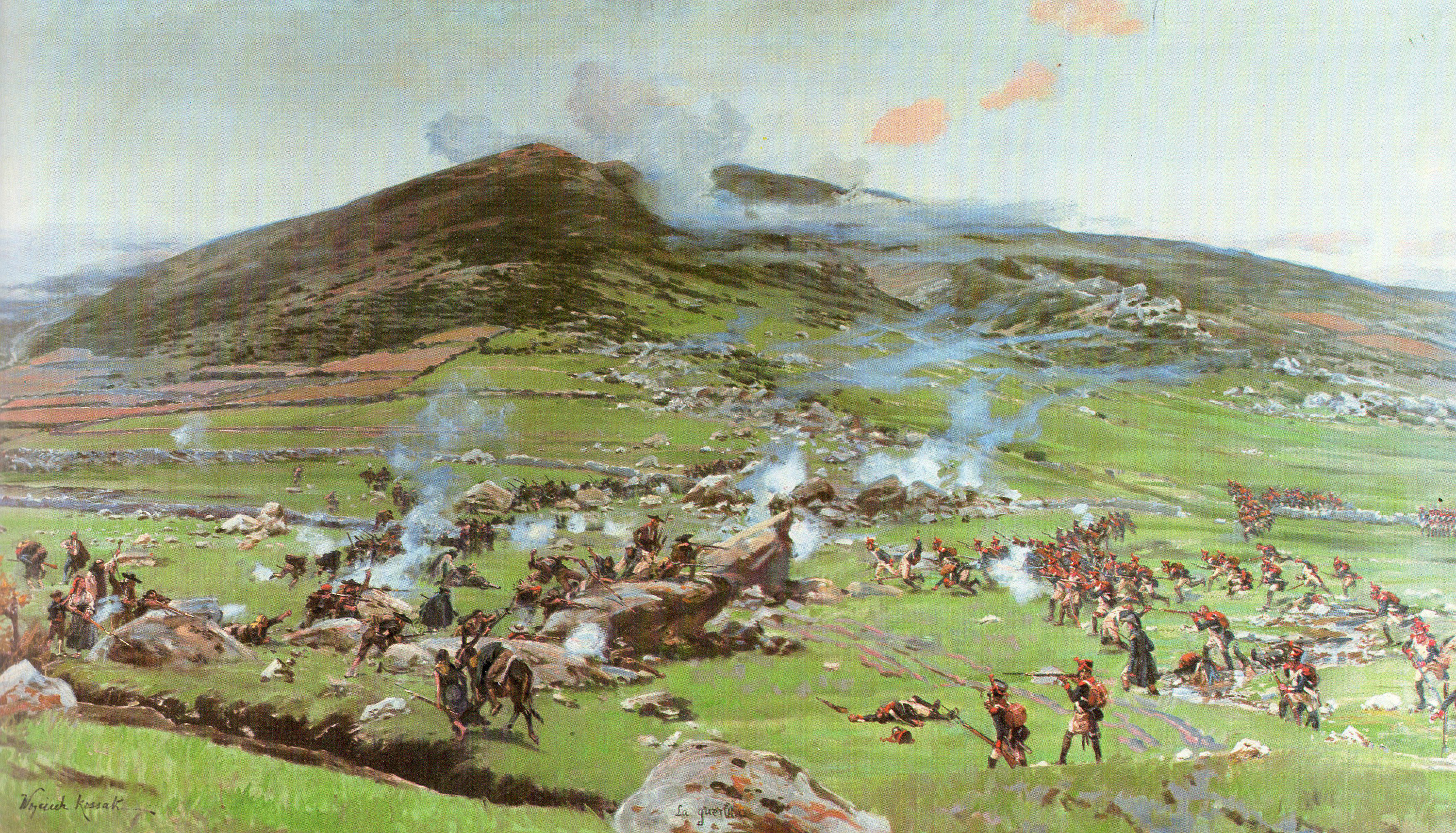 Battle of Somosierra Panorama - La guerilla retreats